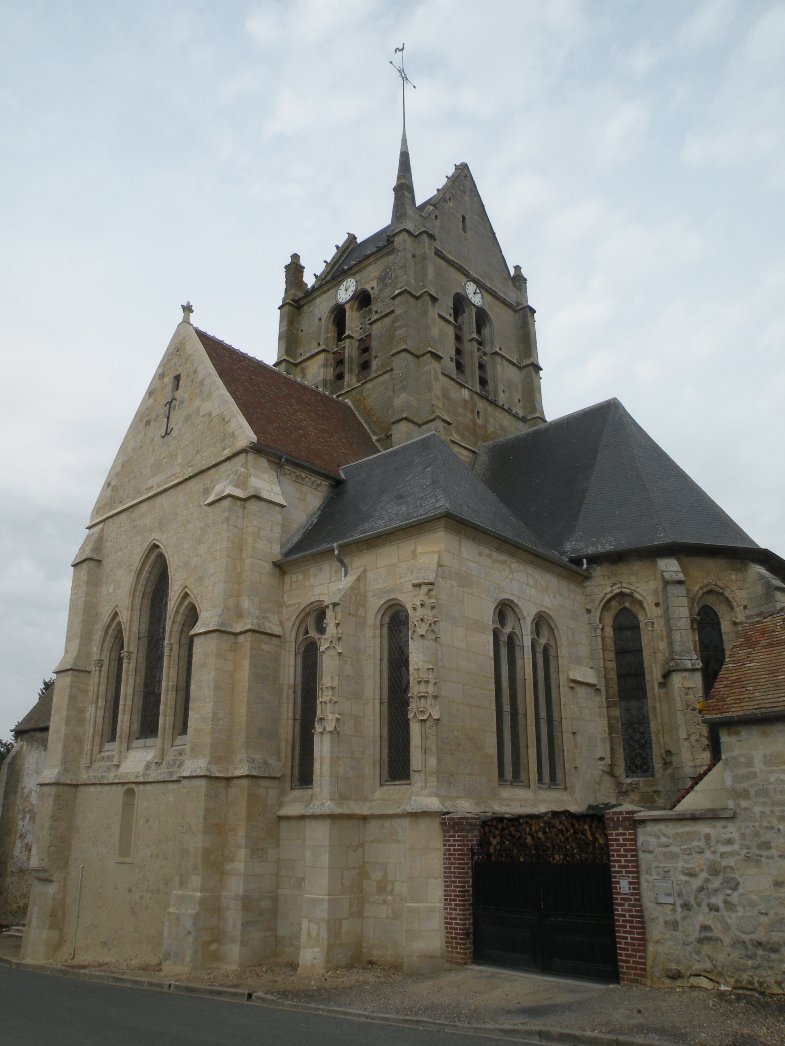 Église Notre-Dame-de-l'Assomption de Fresne-Léguillon